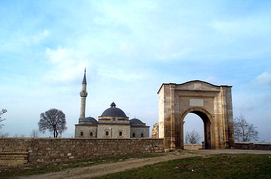 Edirne Turkey